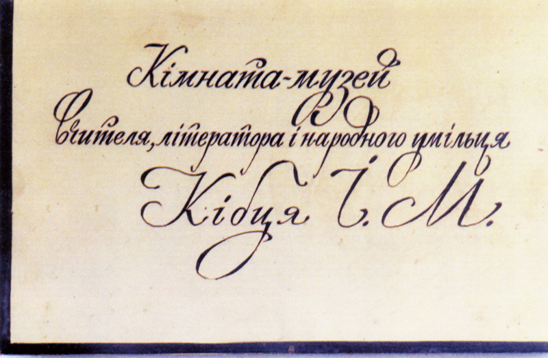 Іван Кібець кімната-музей